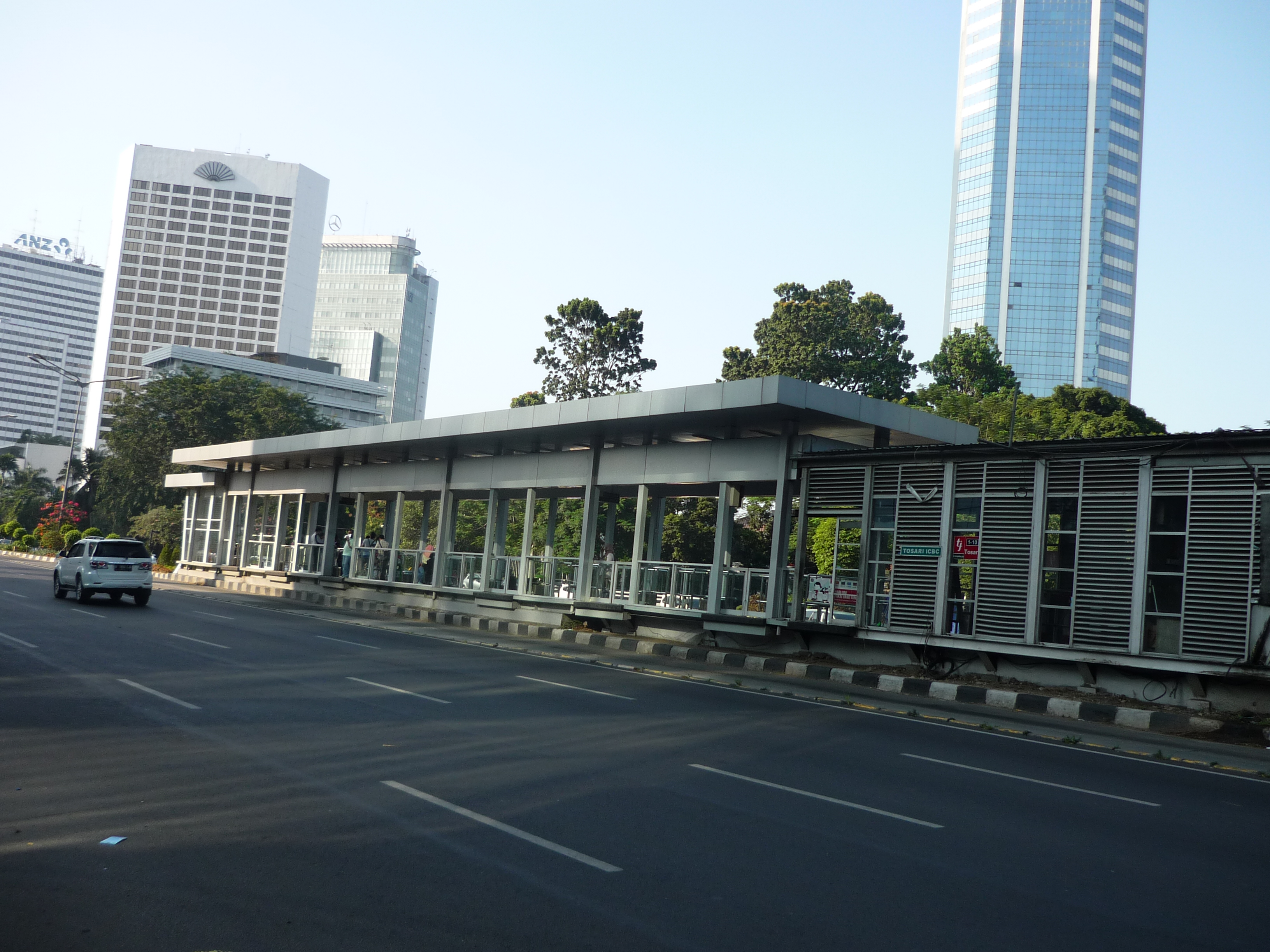 トランスジャカルタのバス停（トサリ停留所、2015年7月）